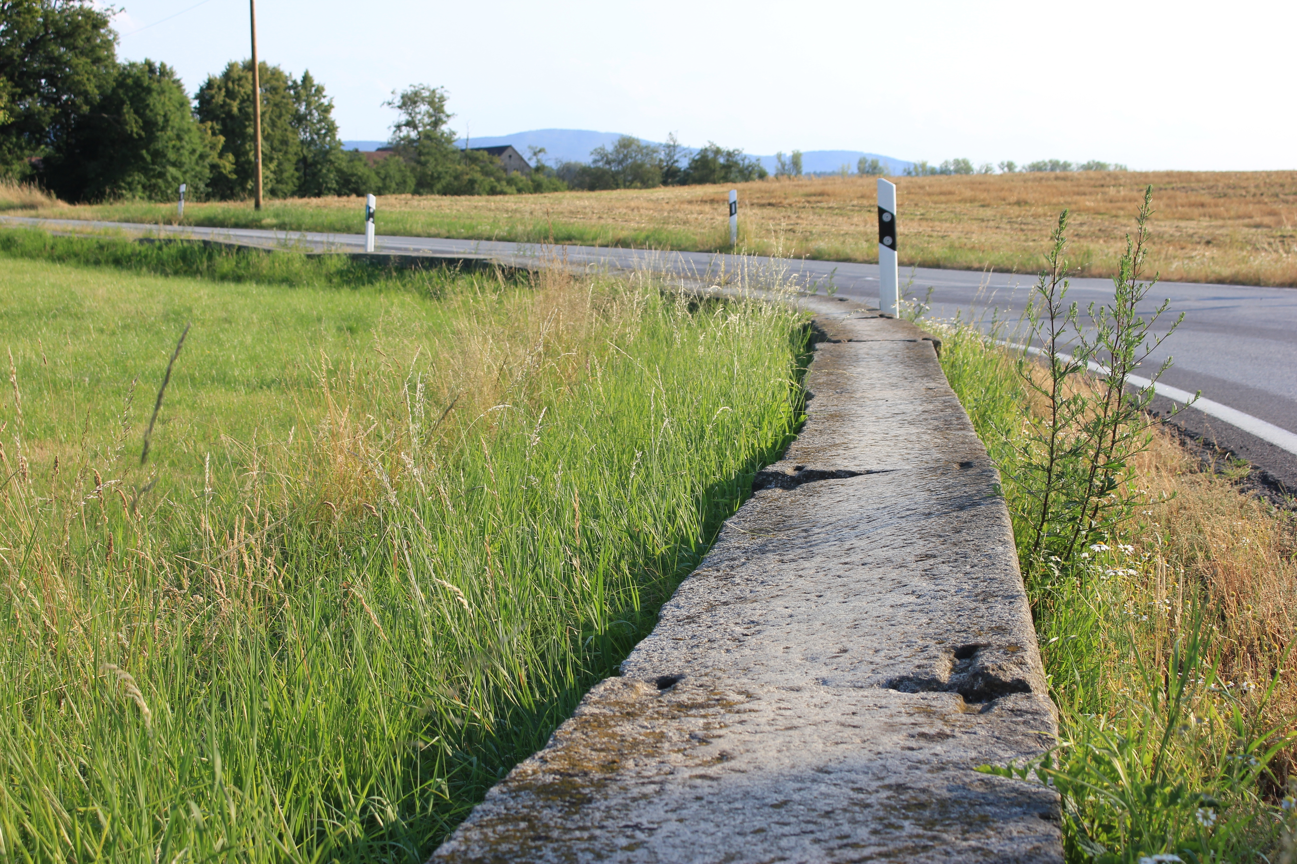 Hornjoserbsce: Cyrkwinska šćežka přez kamjentne ławki přez łučinu Lubaty mjez Njechornjom a Hrodźišćom.